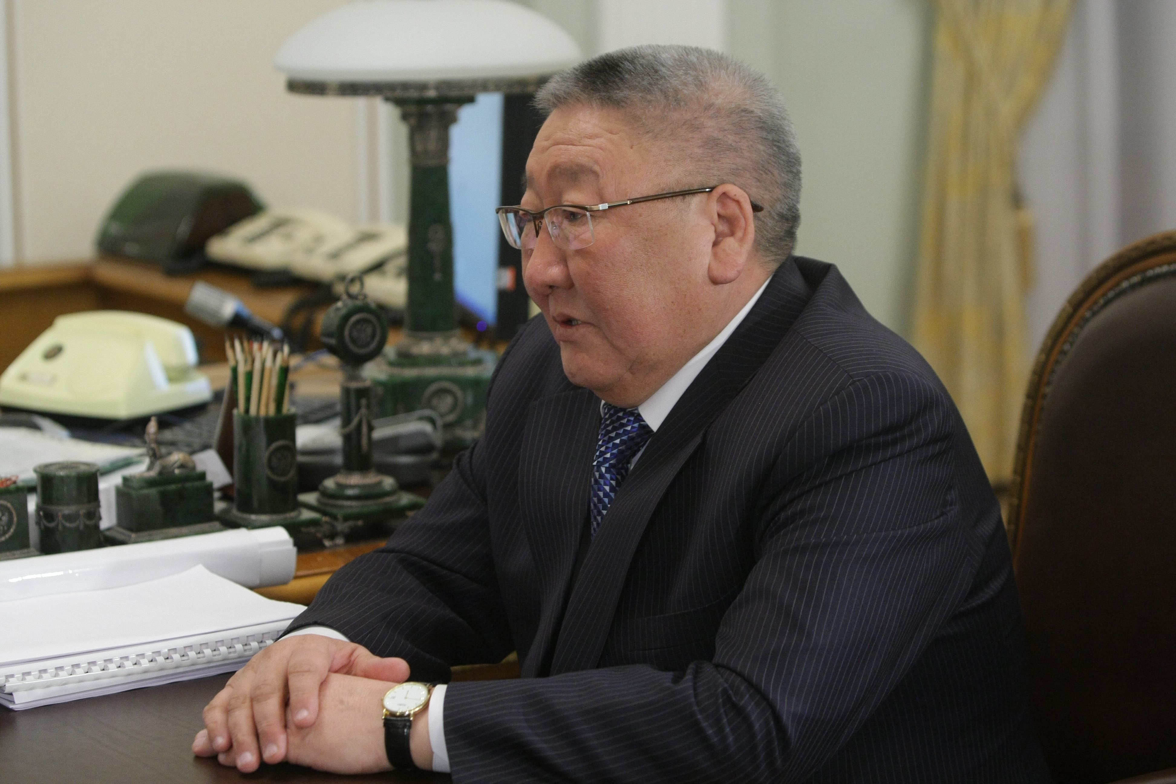 Глава Республики Саха (Якутия) Е. А. Борисов на встрече с Председателем Правительства Российской Федерации В. В. Путиным